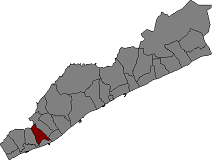 Localització de Premià de Dalt al Maresme